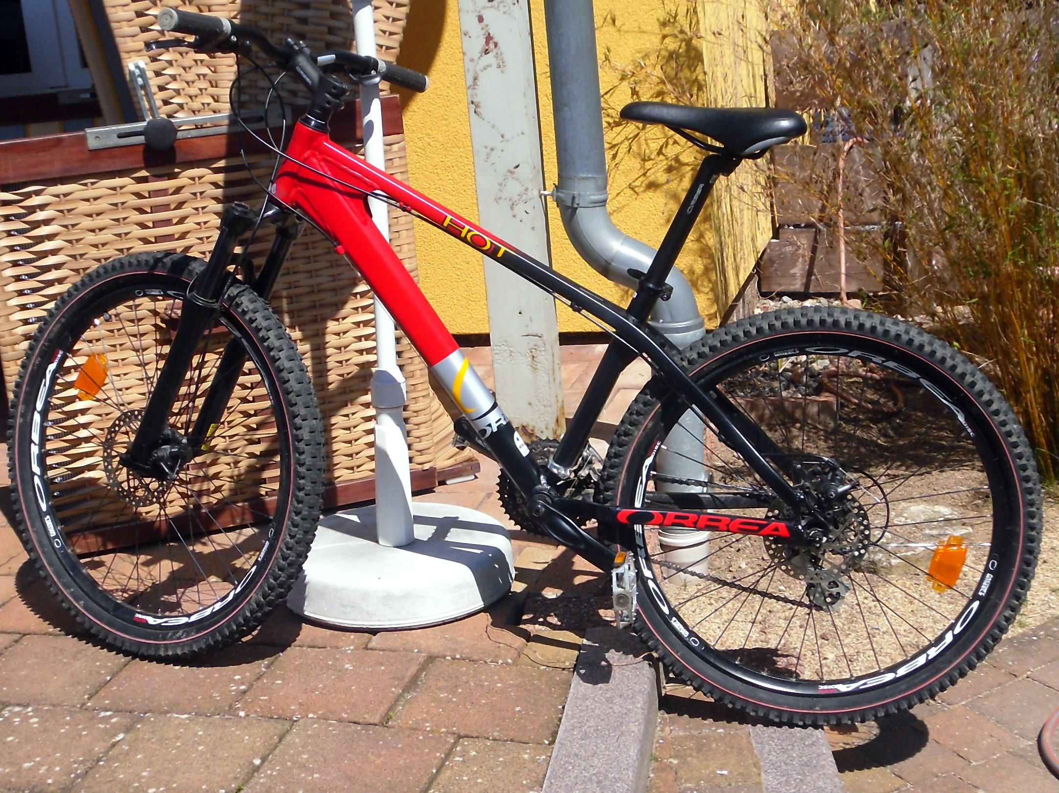 Orbea Hot dirt bike 2007